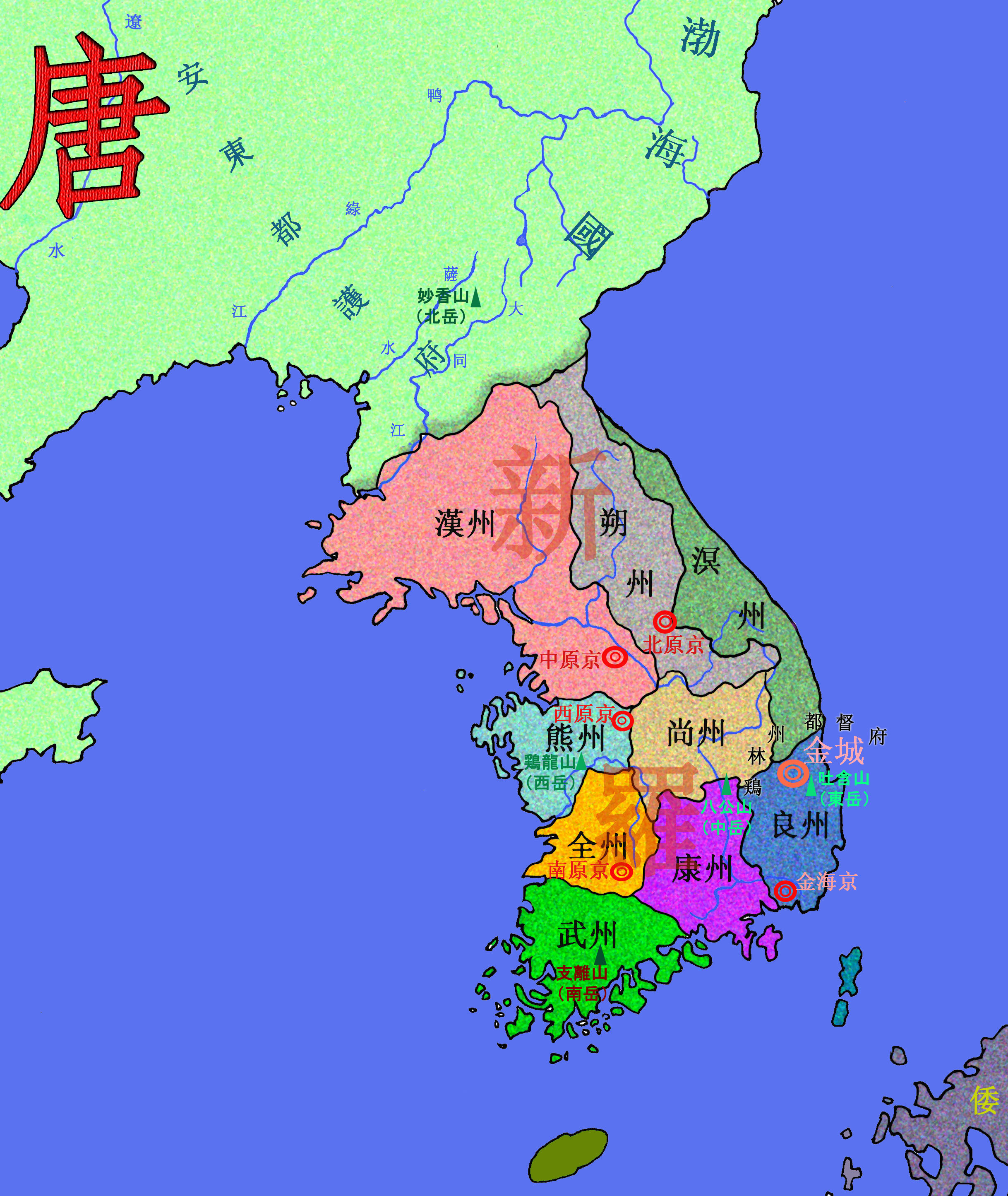 新罗图(map_of_Silla).jpg